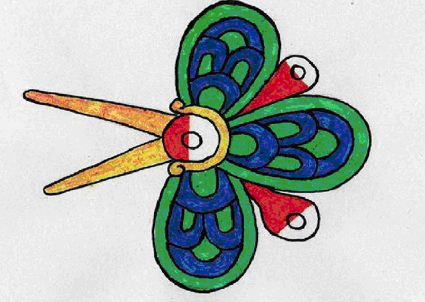 Dibujado en base al Códice Borgia